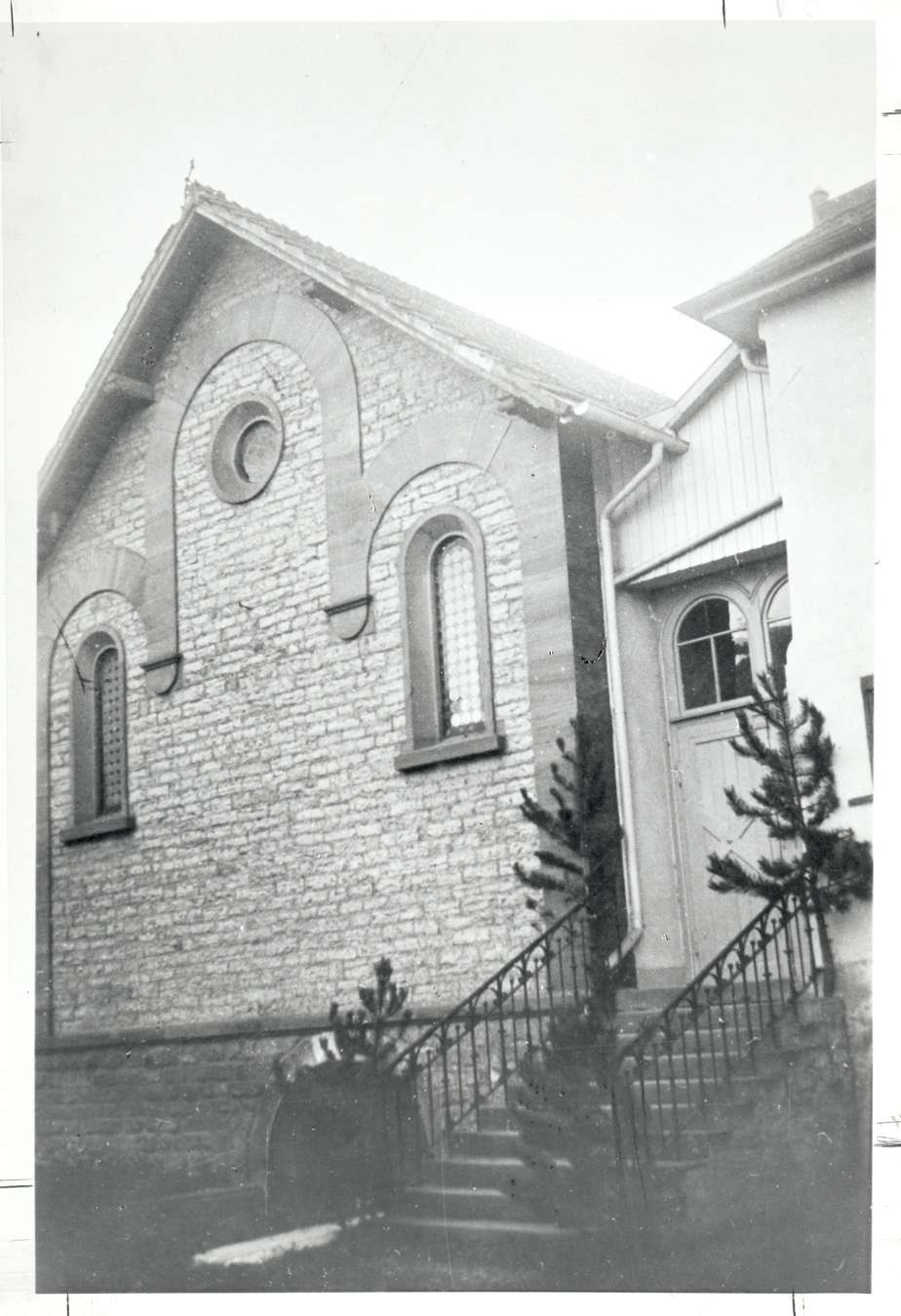 Synagoge (Königheim) Nutzungsbedingungen ausdrücklich auch für Wikipedia (siehe: [1]